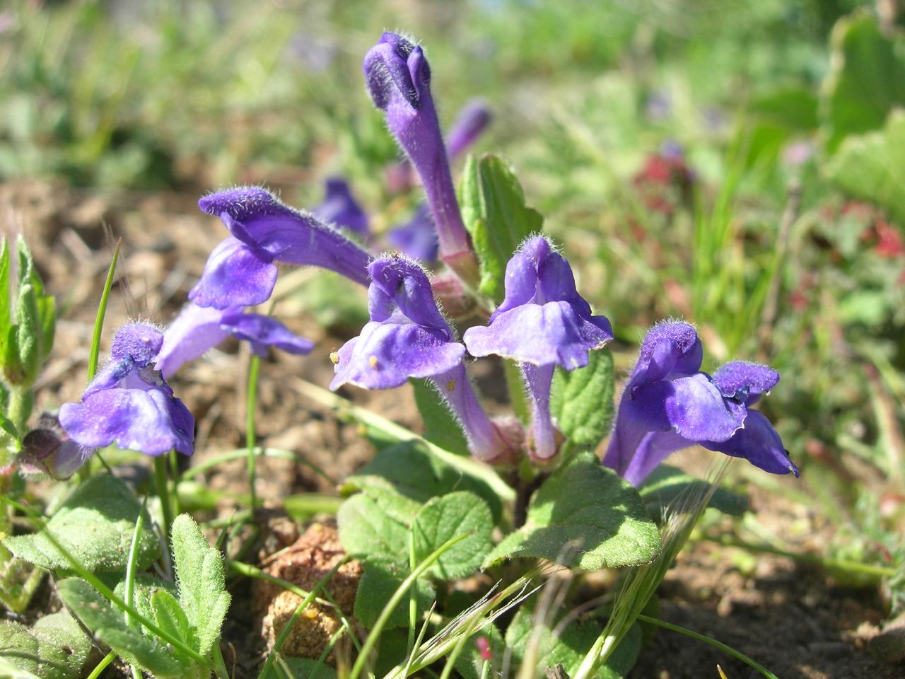 Scutellaria tuberosa (skullcap), Los Angeles, California